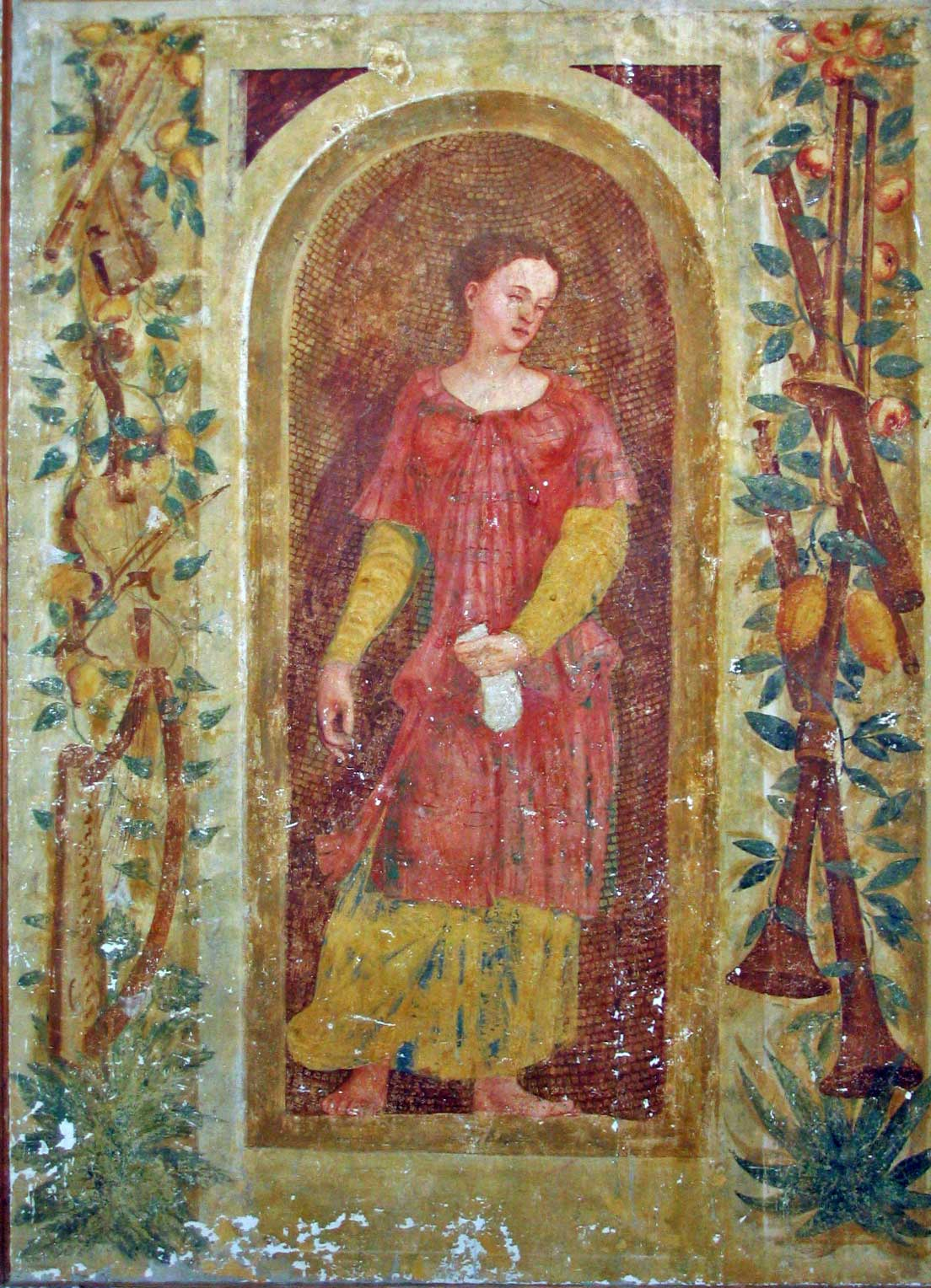 Affreschi del Castello di Malpaga, di Bartolomeo Colleoni. Particolare: Allegoria della Carità. Foto di Giorces.